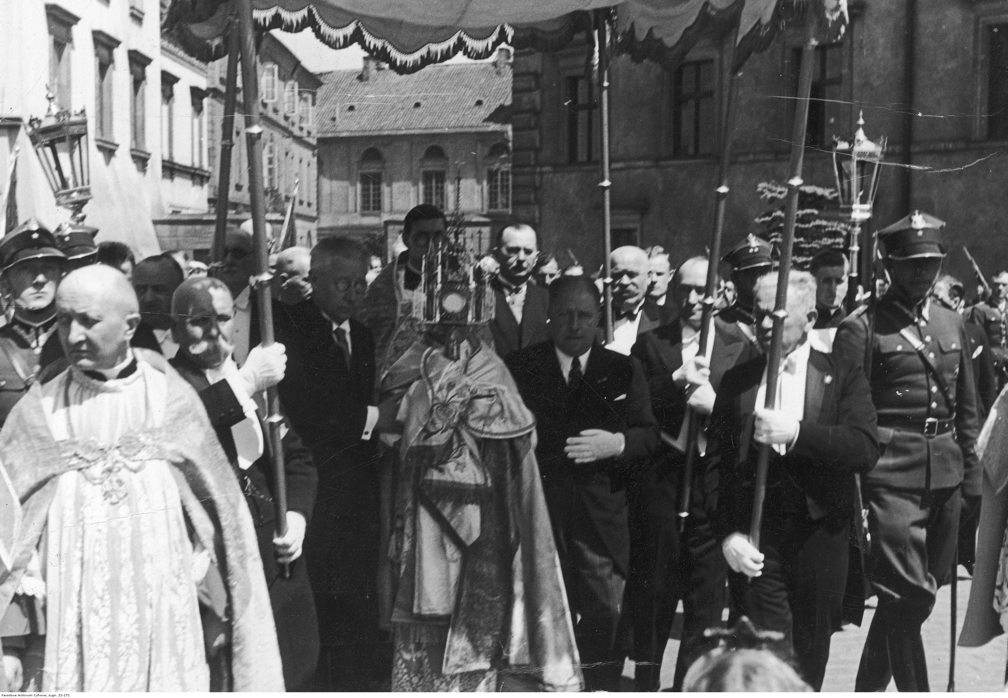 Fragment procesji. Widoczni m.in.: nuncjusz apostolski Filippo Cortesi (niesie monstrancję z Najświętszym Sakramentem), minister wyznań religijnych i oświecenia publicznego Wojciech Świętosławski (na lewo od nuncjusza) i prezes Najwyższej Izby Kontroli gen. Jakub Krzemieński (na prawo od nuncjusza).